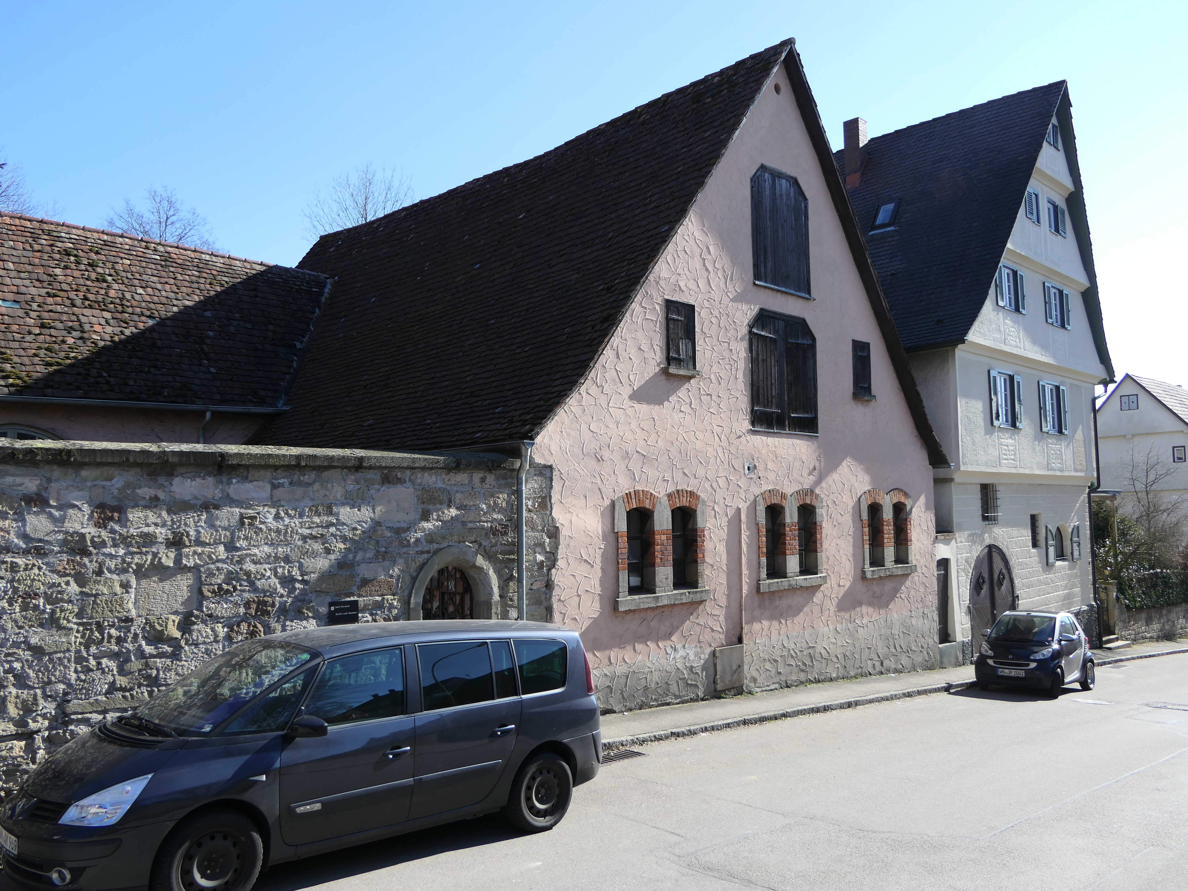 Das Schloss Grossheppach im gleichnamigen Teilort der Stadt Weinstadt im Rems-Murr-Kreis. Stadtarchiv Außenansicht.